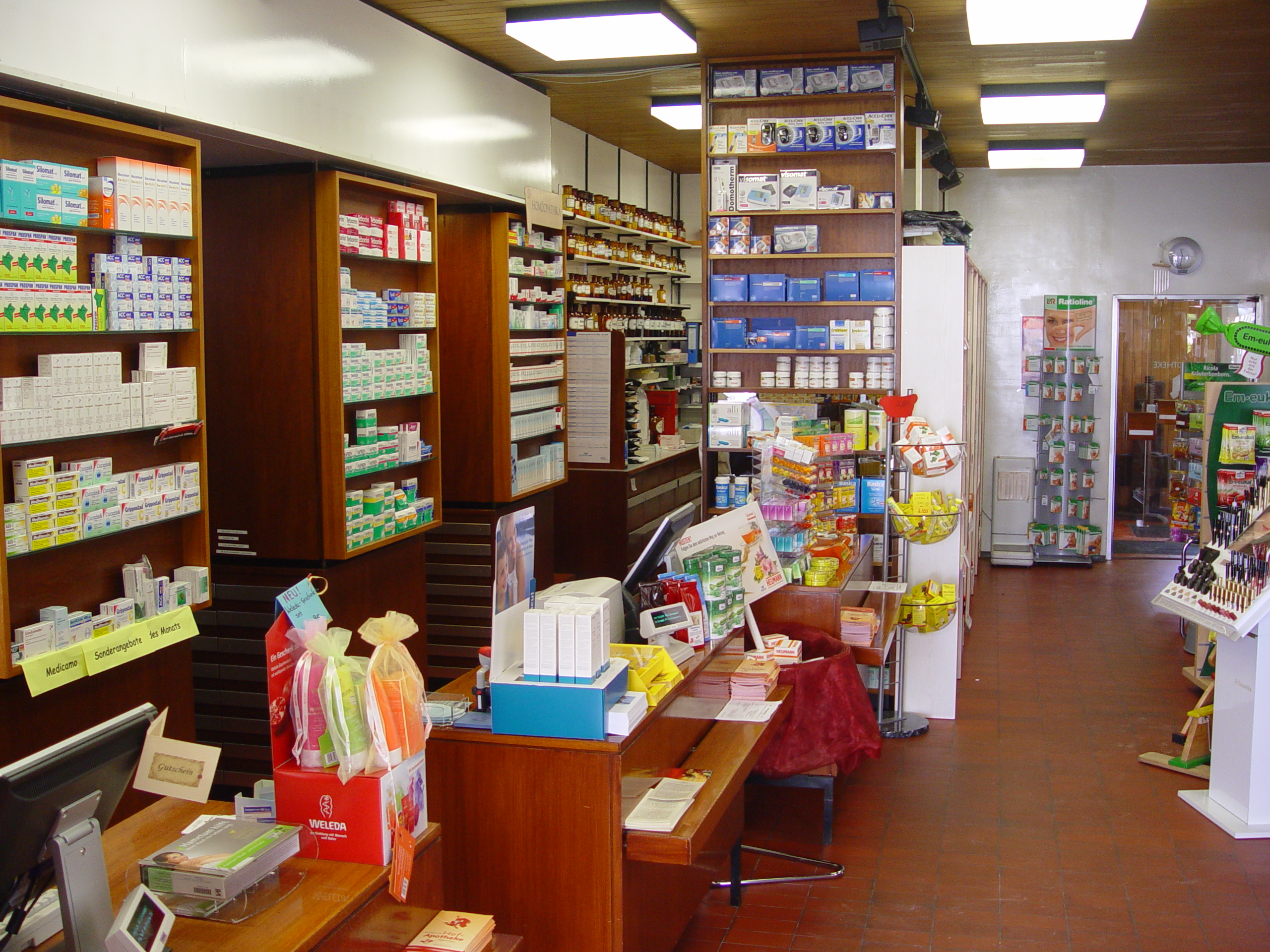 Hofapotheke in Sigmaringen, Innenansicht